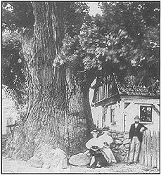 Albrechtický dub kolem roku 1890